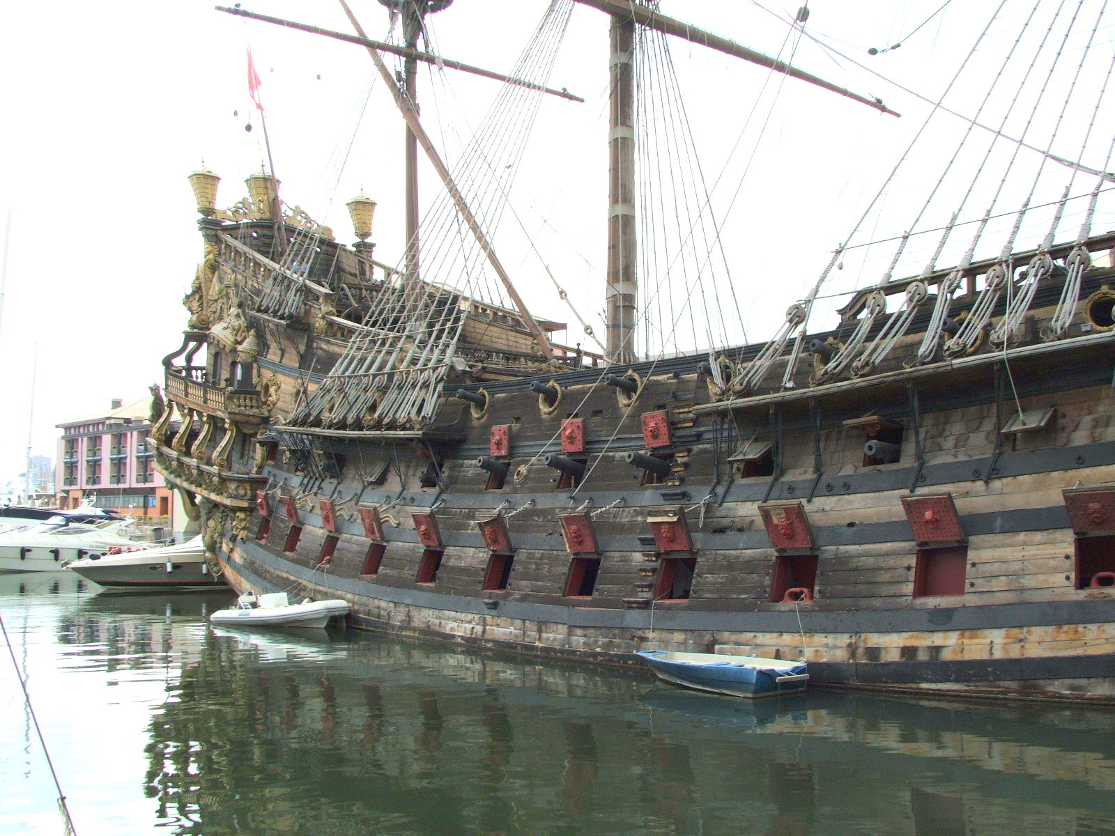 Genova, immagine dal porto antico, piazza Caricamento